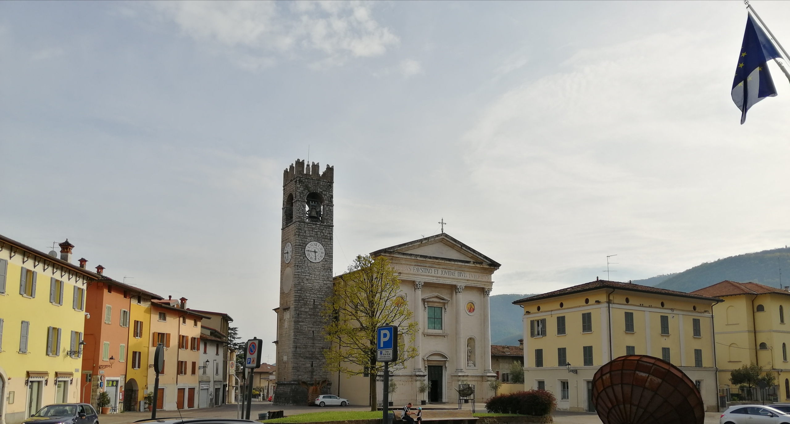 Foto Piazza Sarezzo